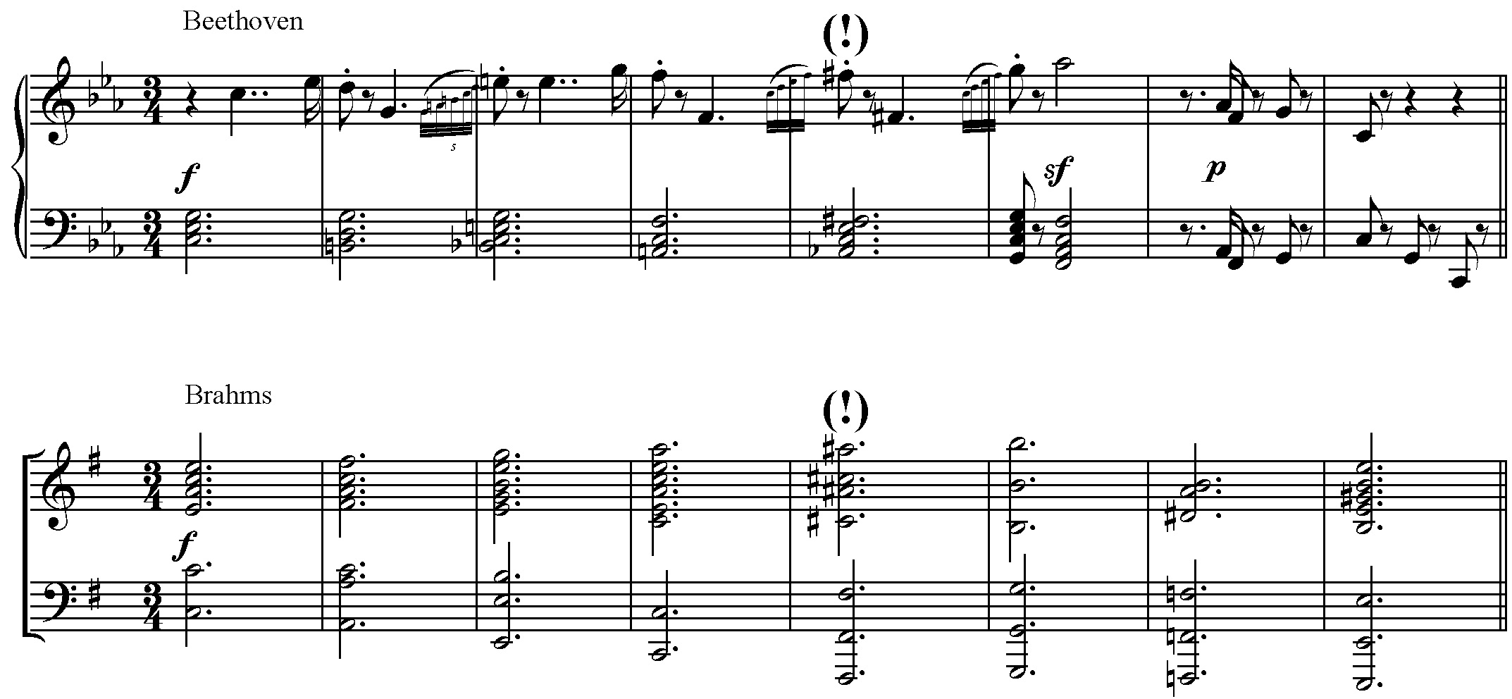 Die ersten 8 Takte von Beethovens Variationen WoO 80 und Brahms' Finale der 4. Sinfonie